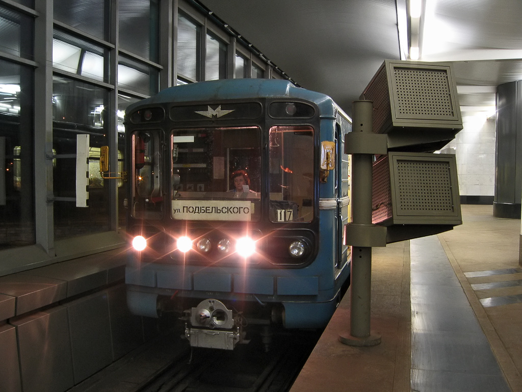 Электропоезд 81-717/714 на станции Воробьёвы Горы Московского метрополитена. В кабине машинист электропоезда 1-го класса Наталья Владимировна Корниенко